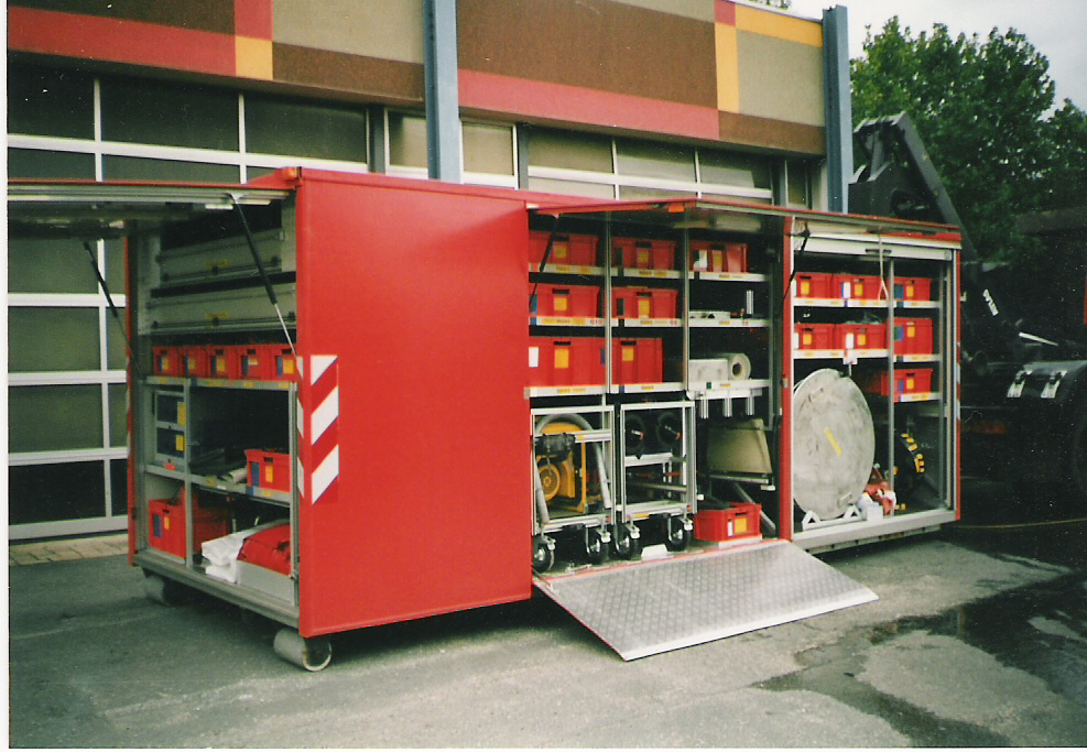 Abrollbehälter Gefahrgut der BF Dortmund